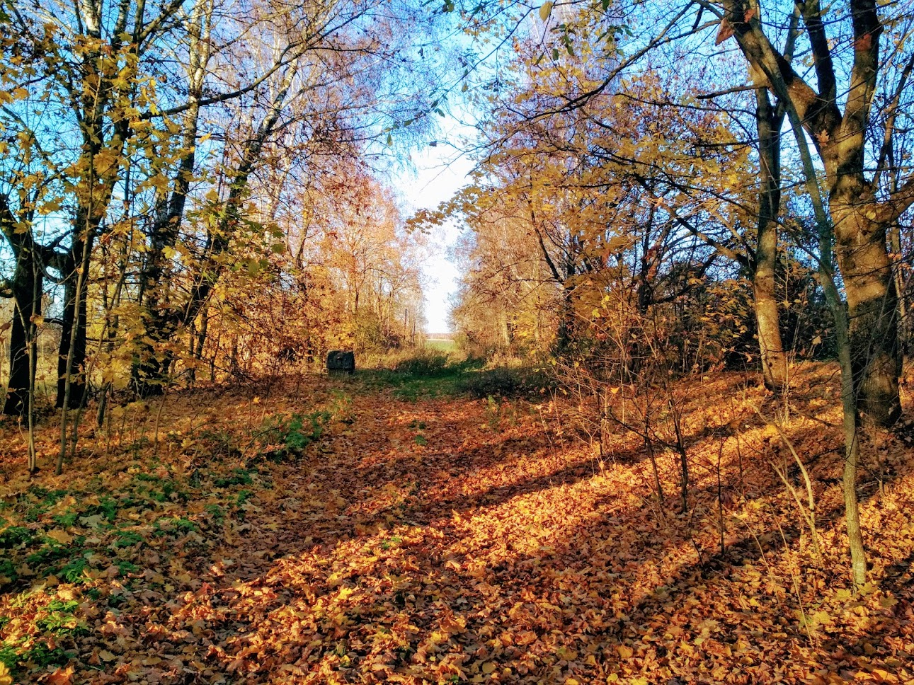 Центральная улица деревни Ляховка Шкловского района